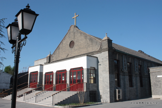 Gangwashi Church